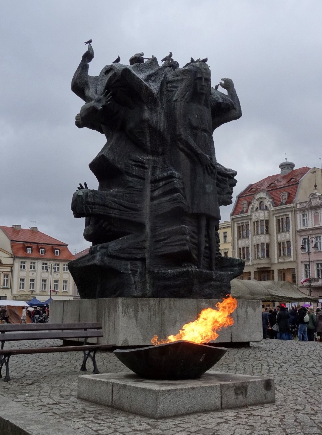 Pomnik Walki i Męczeństwa na Starym Rynku w Bydgoszczy